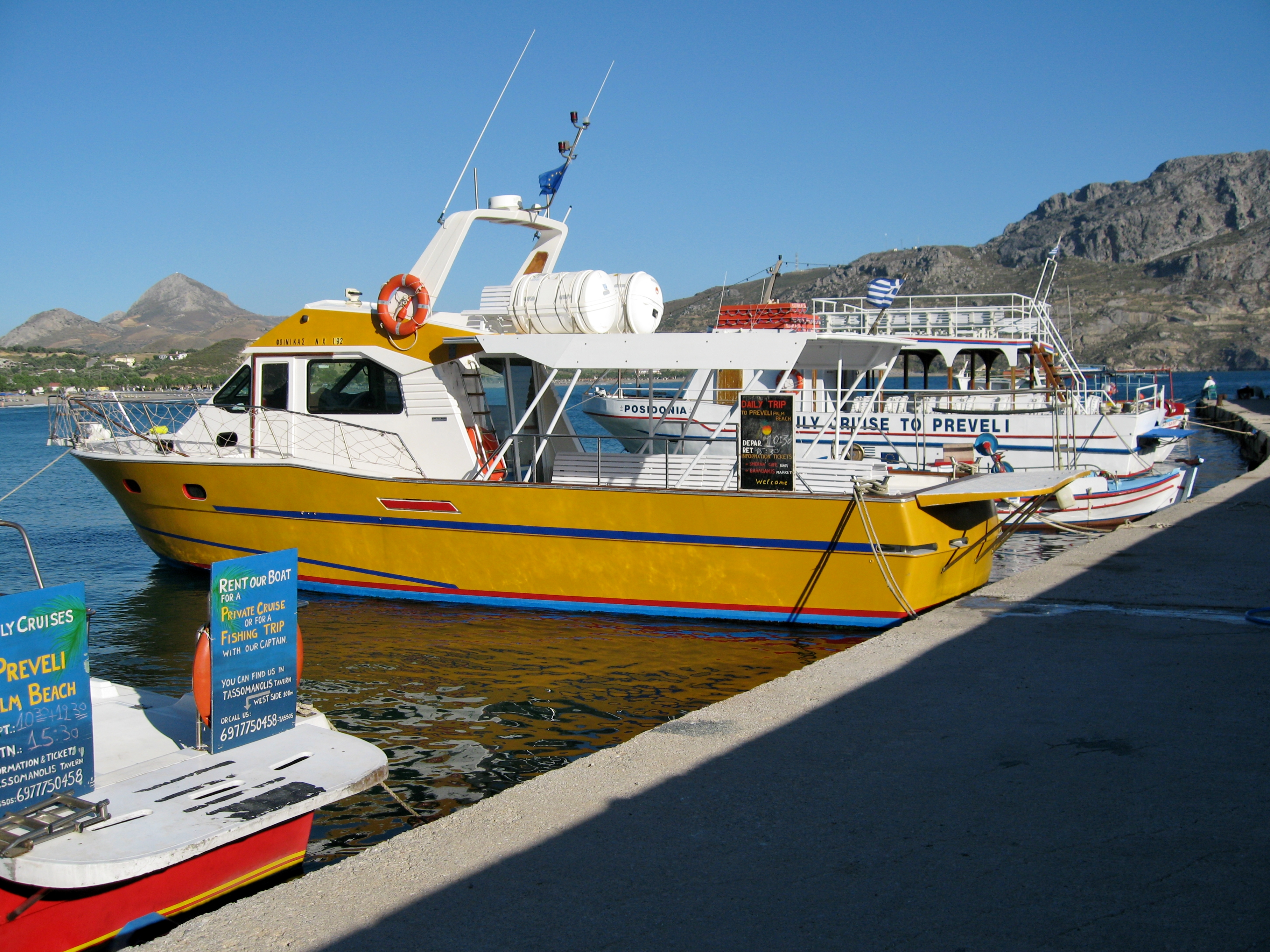 Ausflugsboote im Hafen von Plakias, Gemeinde Agios Vasilios, Regionalbezirk Rethymno, Kreta, Griechenland